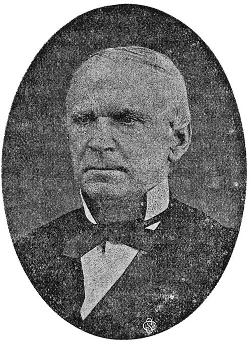 Retrato de Pedro Carbo y Noboa.